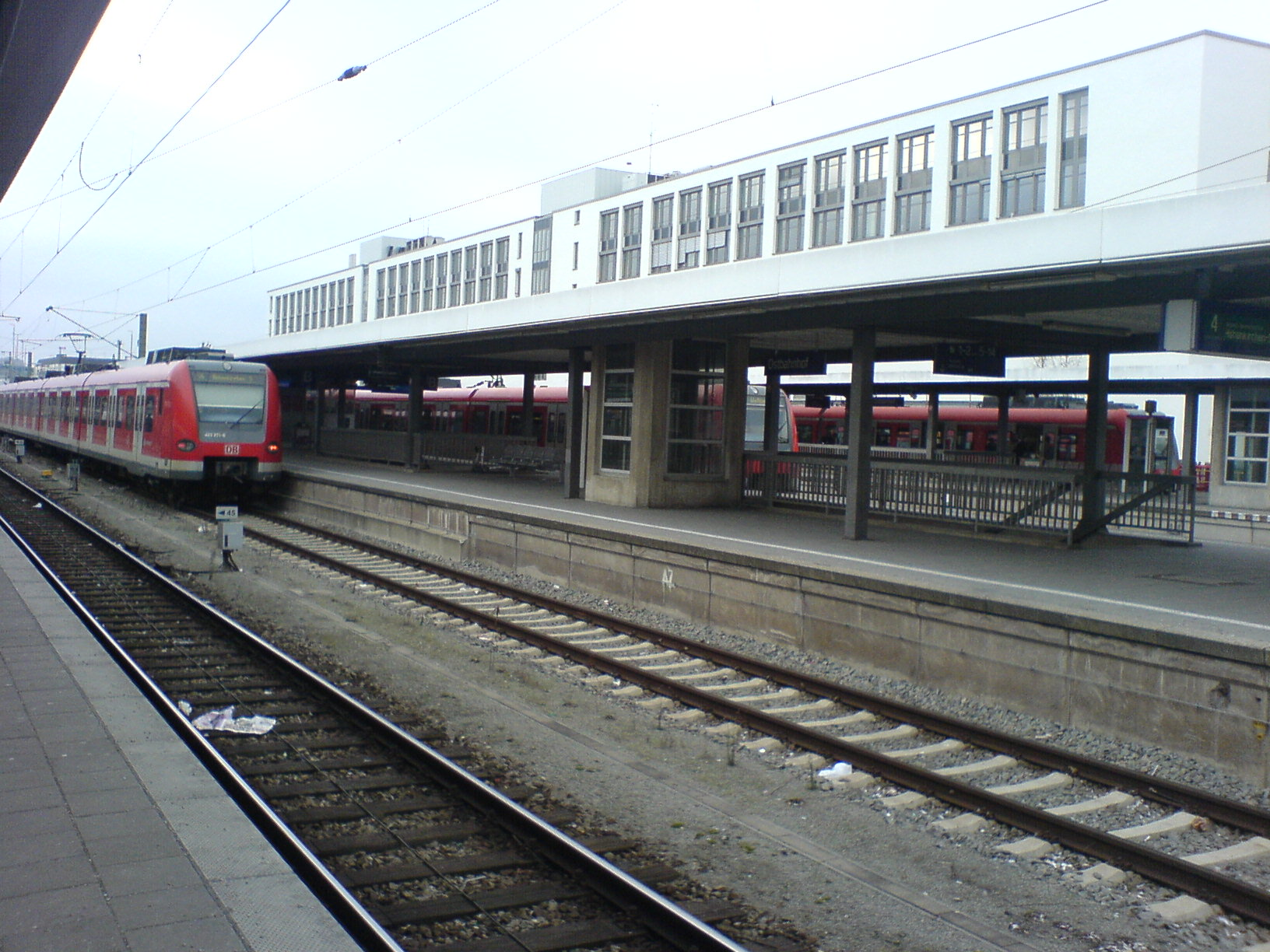 Bahnhof München Ost - Bahnsteige, S-Bahnen und Bahnhofsgebäude